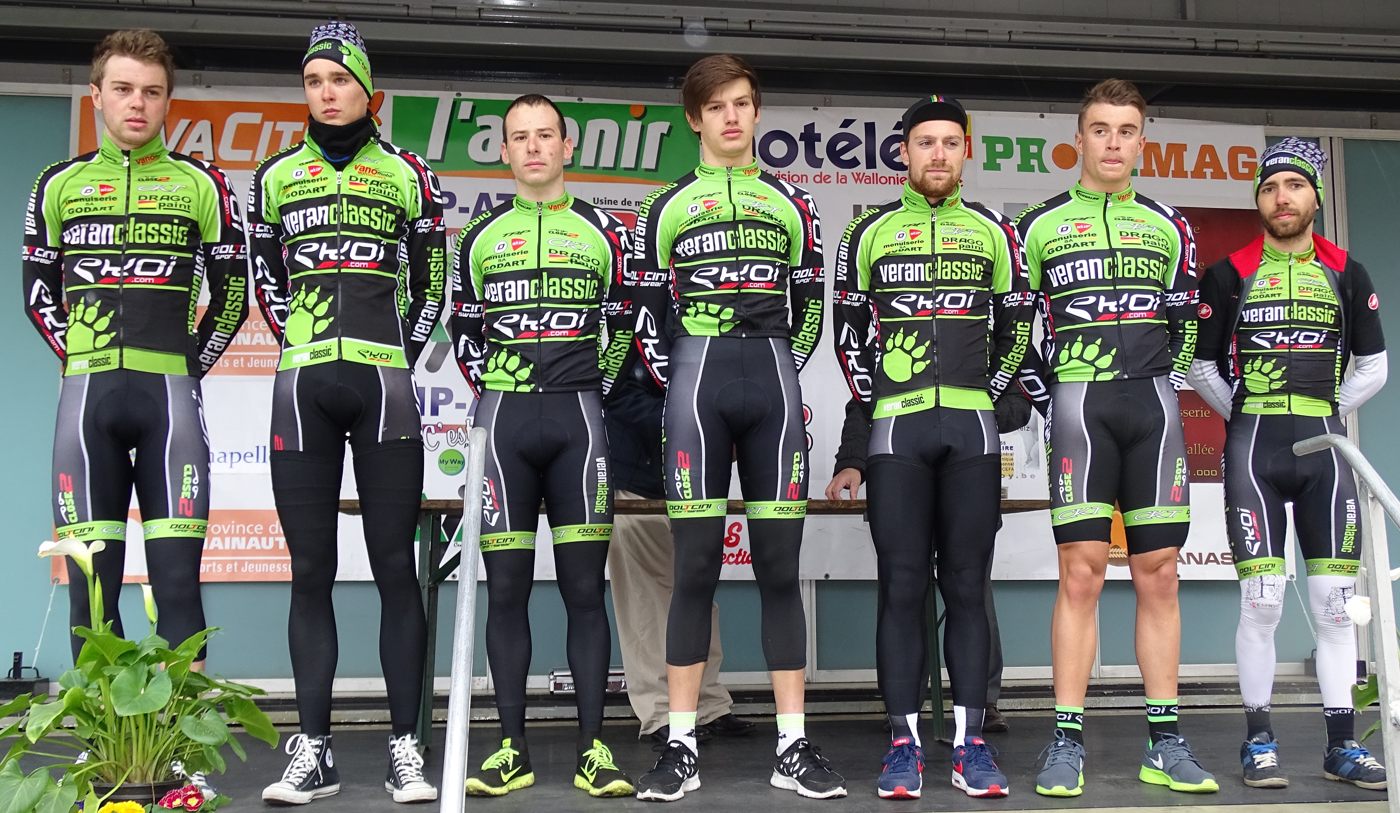 Triptyque des Monts et Châteaux 2015 Depicted team: Veranclassic-Ekoï